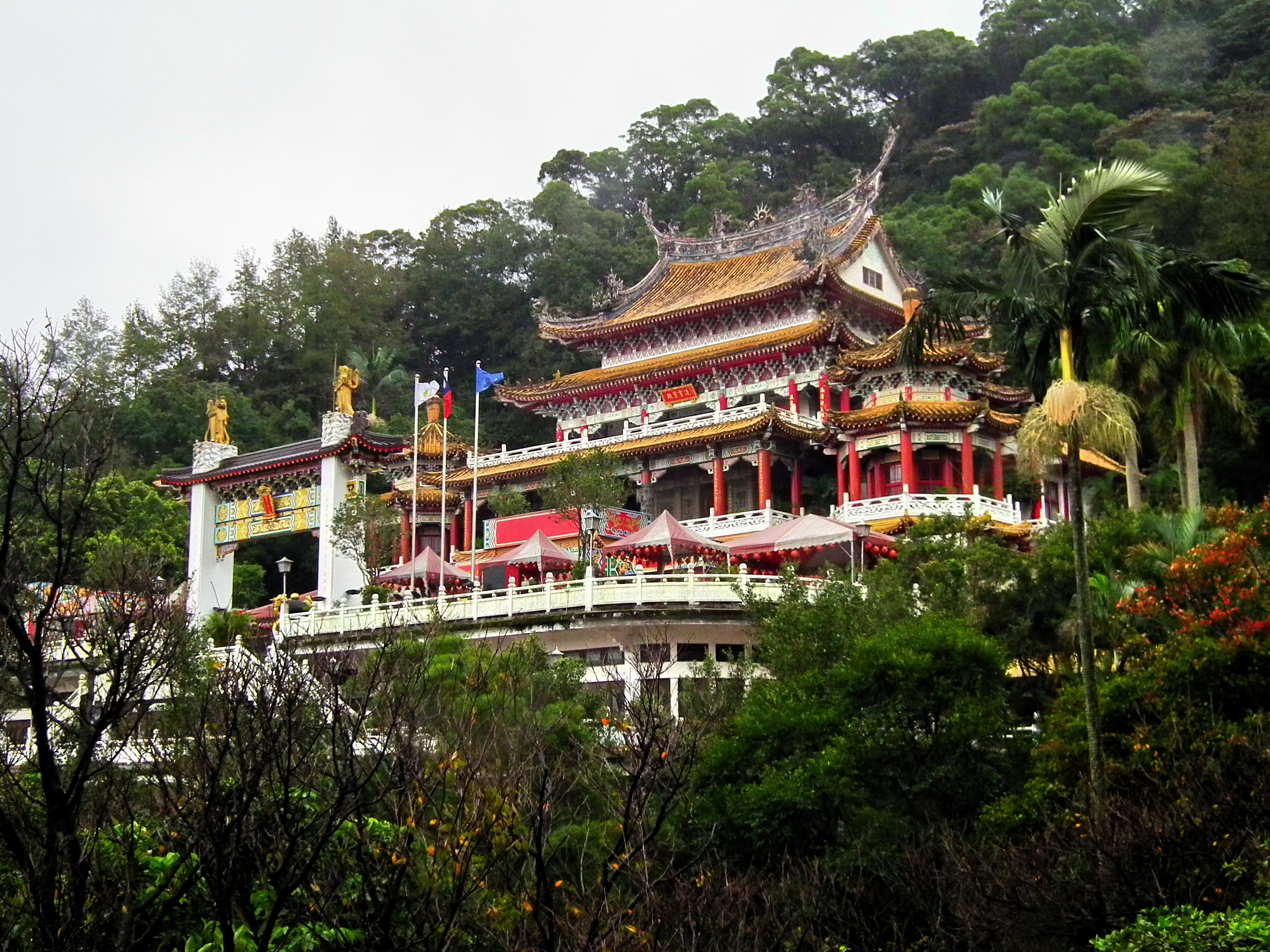 木柵指南宮 Muzha Zhinan Temple